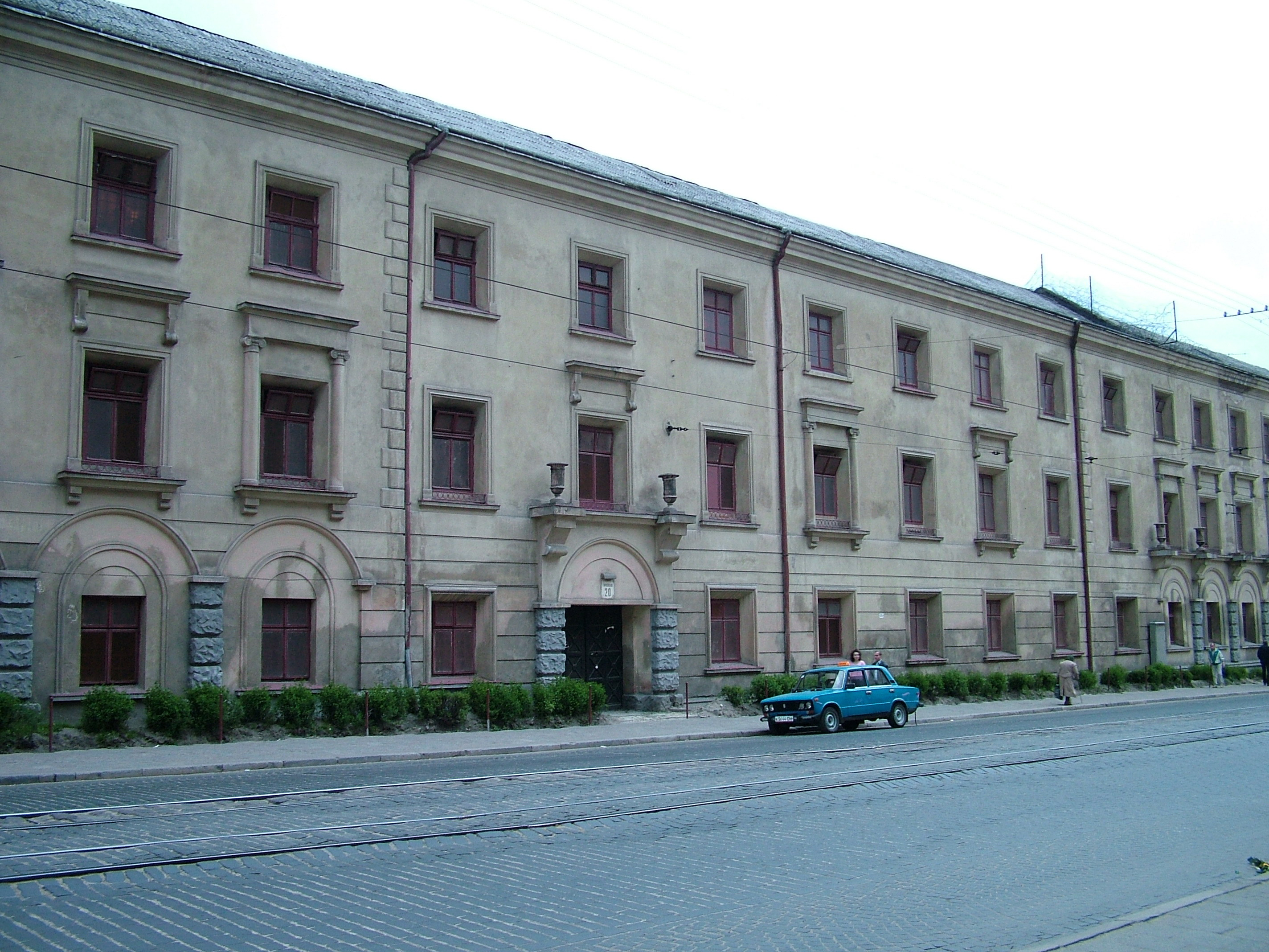 Lwów. Więzienie Brygidki. Maj 2005. Autor fot. Stanisław Kosiedowski.